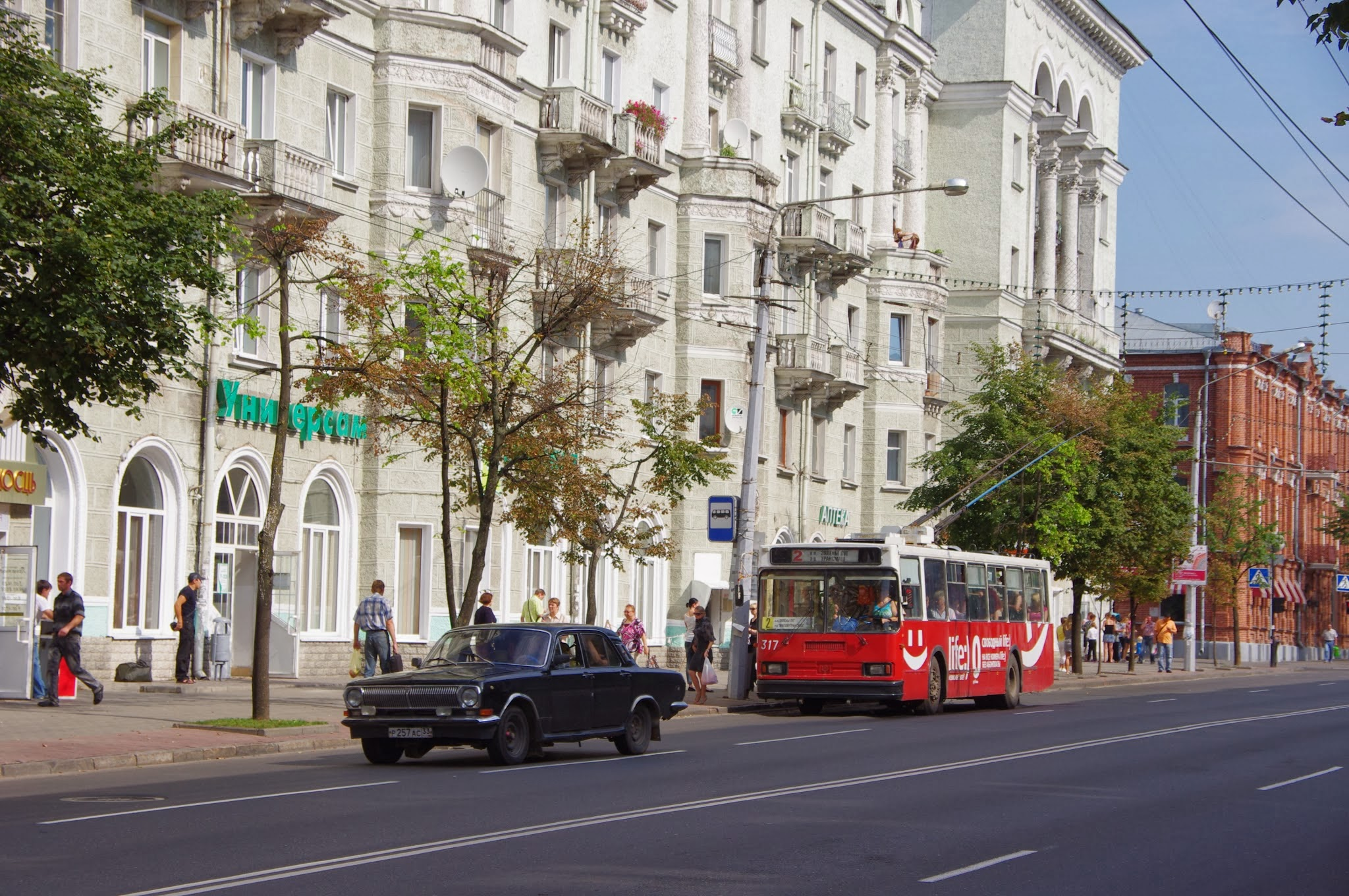 Lieninski District, Mogilev, Belarus